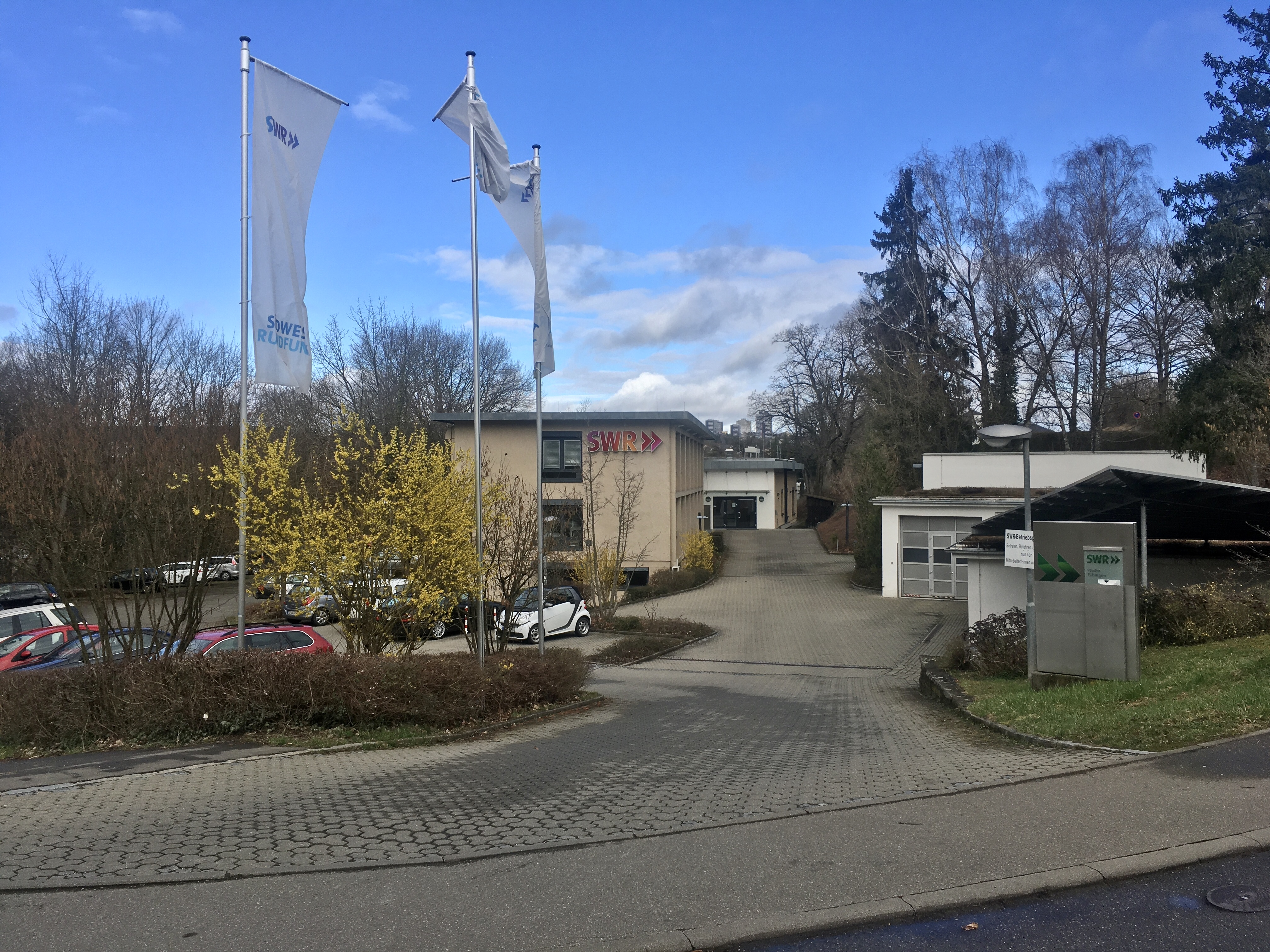 Das SWR Studio Tübingen im Matthias-Koch-Weg 7